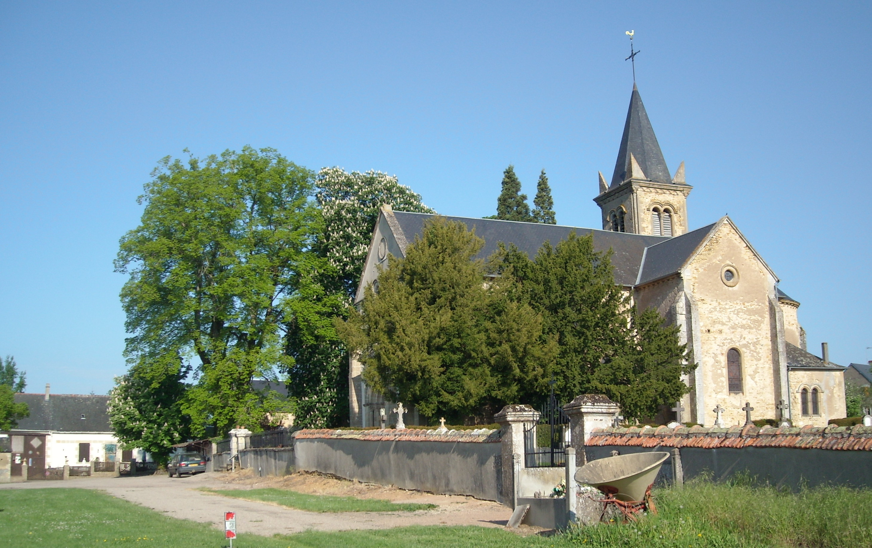 Église de Sainte Marie XIXème siècle (Nièvre)